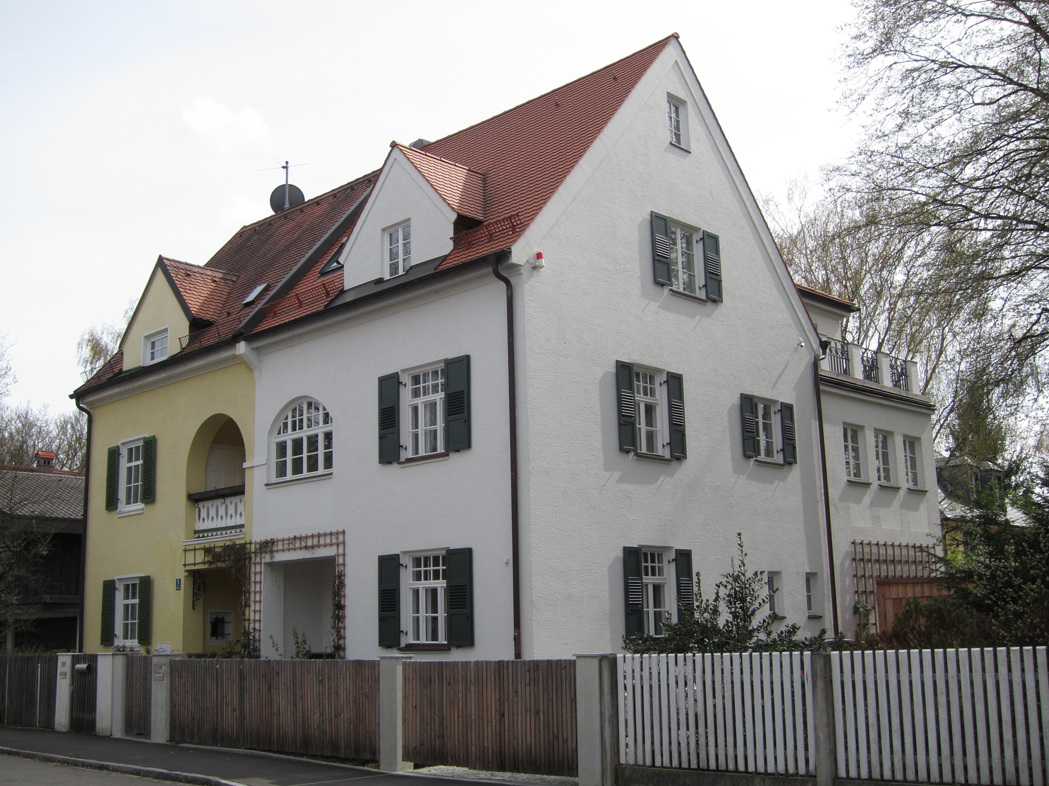 Lichtingerstraße 3/5; Doppelvilla, schlichter Jugendstil, 1901–02 von Andreas Kollmannsberger.